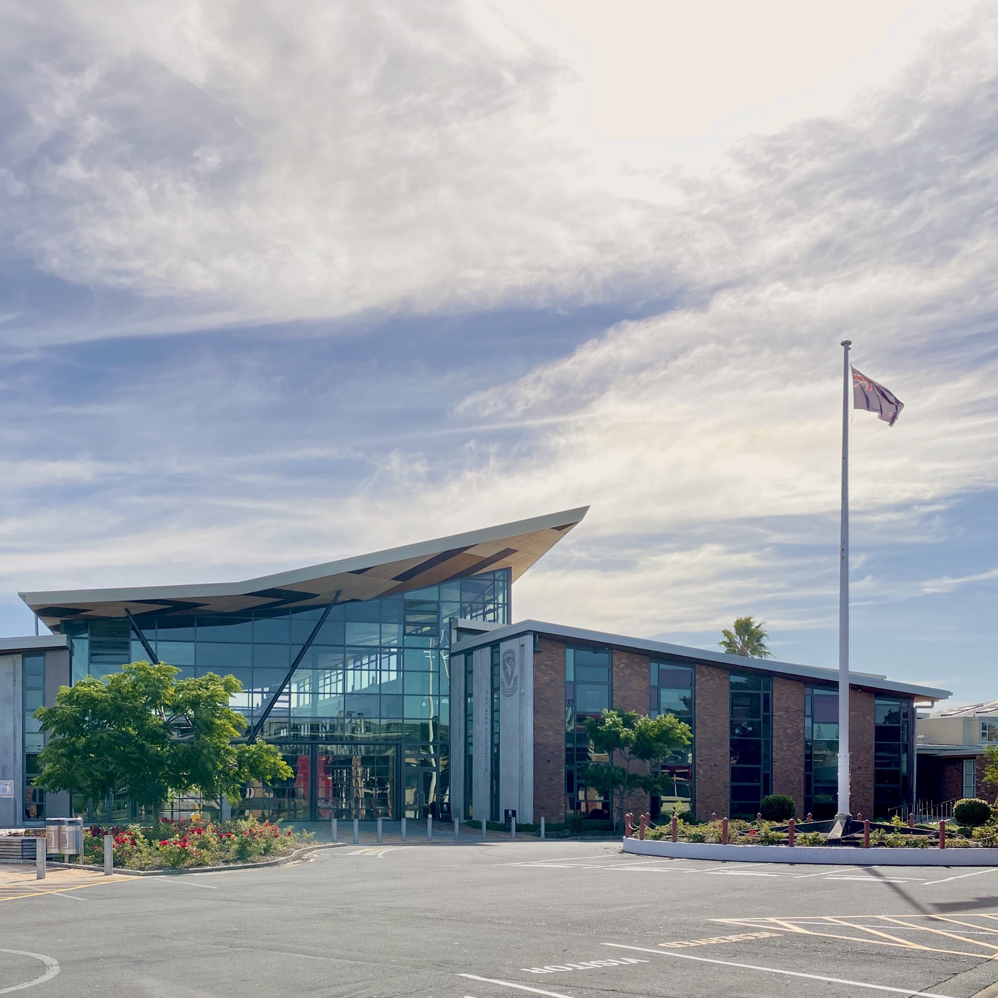 正面ゲートを入った先の駐車場から望む